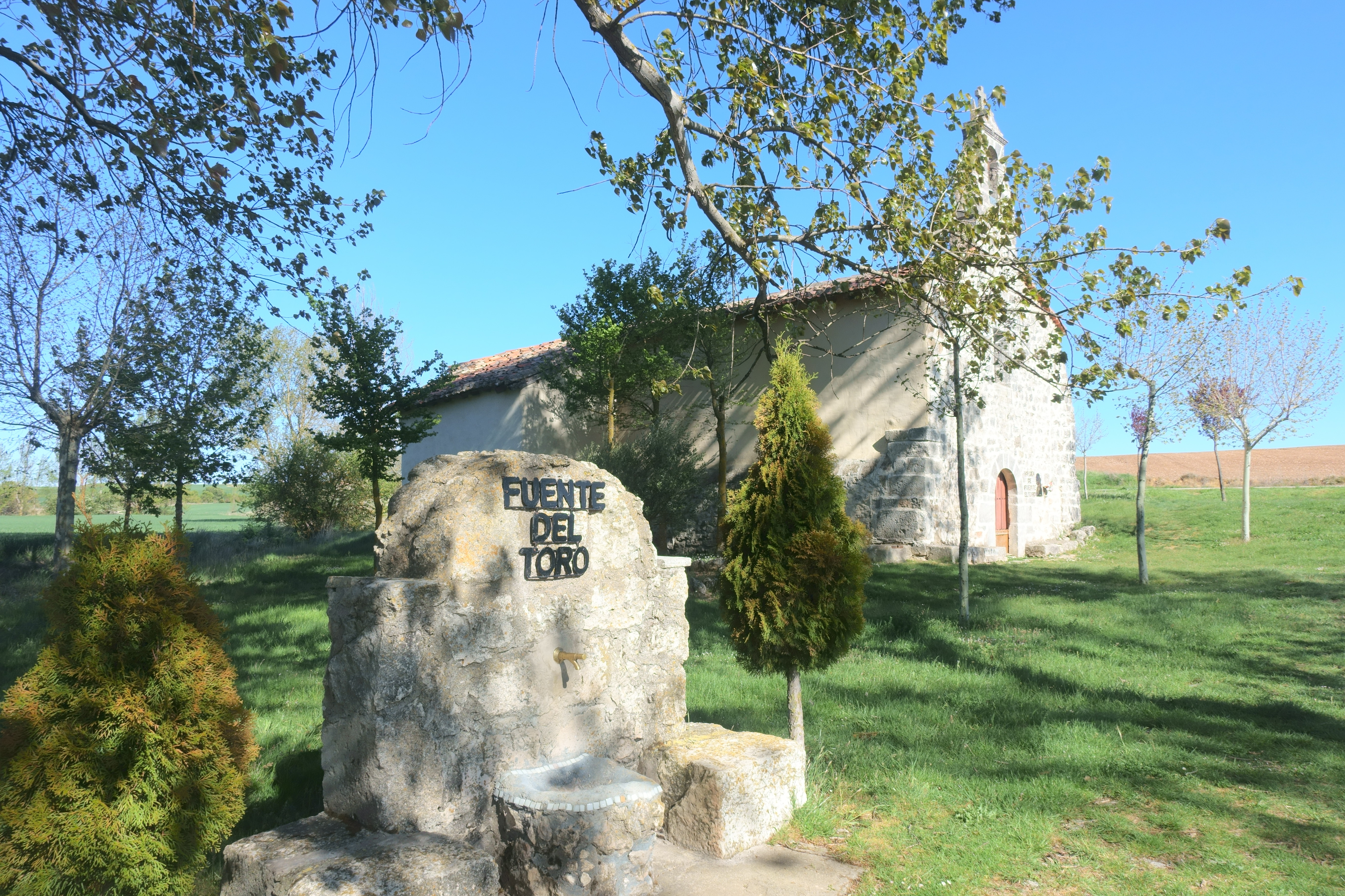 Ermita de Fuenteltoro, Villangómez (Burgos, España).